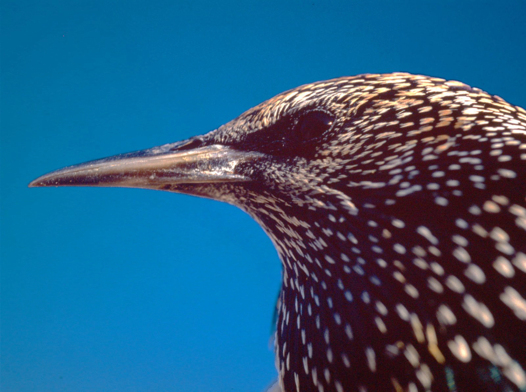 Estornino pinto, Sturnus vulgaris